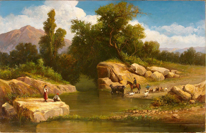 Paysage de Nicola Palizzi, huile sur toile, 74 x 116 cm.